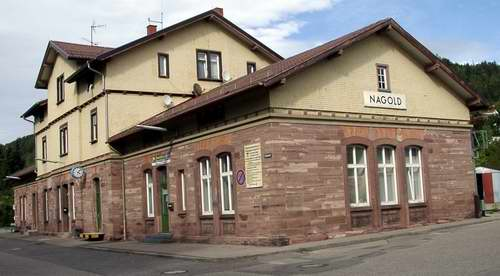 Nagold Bahnhof 2004 - selbst fotografiert von Benutzer:Enslin 13.09.2004